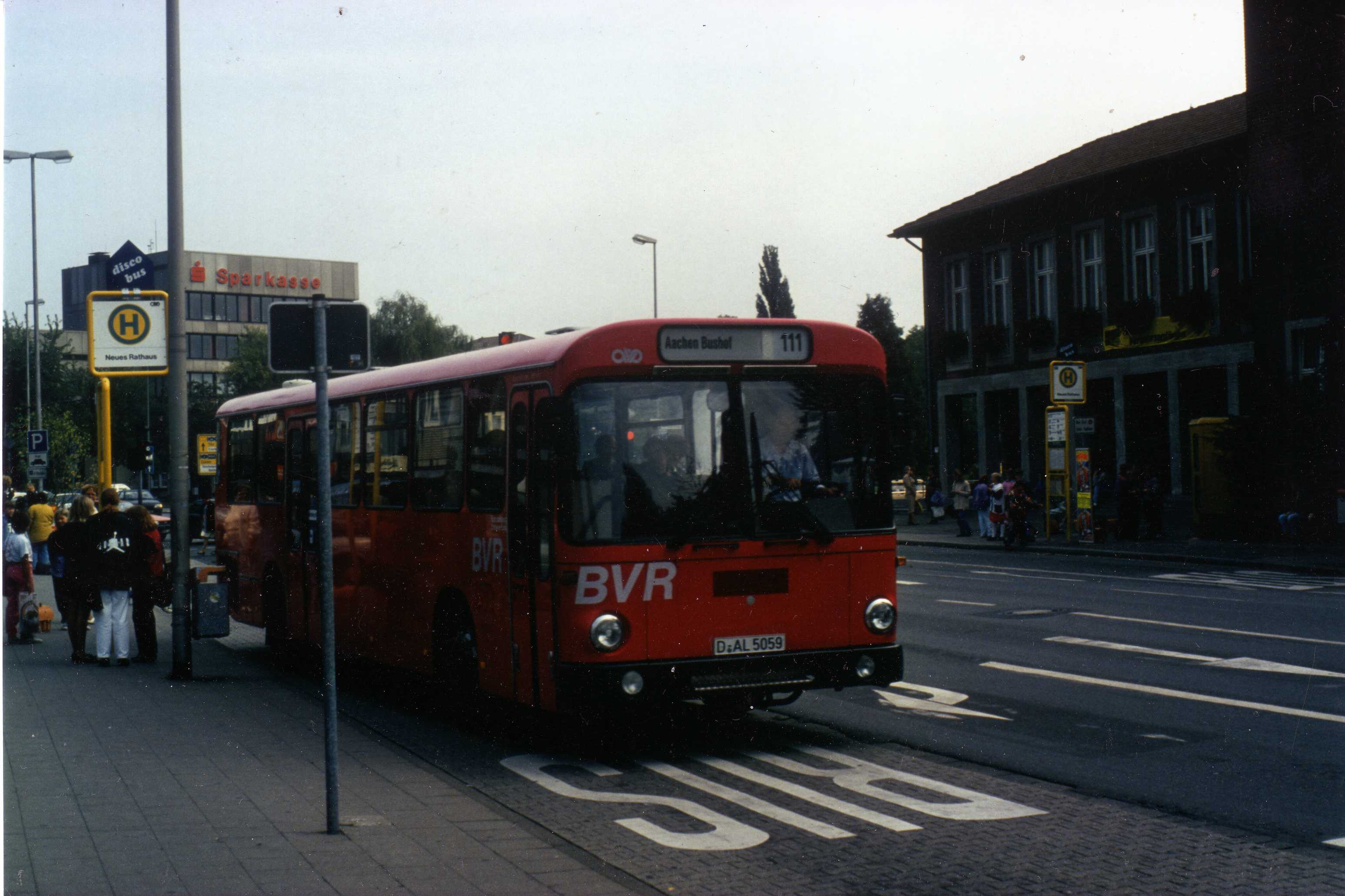 Bahnbus der Busverkehr Rheinland (BVR) in der damals neuen himbeerroten Farbgebung als Linie 111 an der zentralen Haltestelle Neues Rathaus in Jülich. Die Fahrt nach Aachen verläuft ab Alsdorf über die Autobahn, dementprechend wurde die 111 später in SB 11 (Schnellbus) umbenannt.